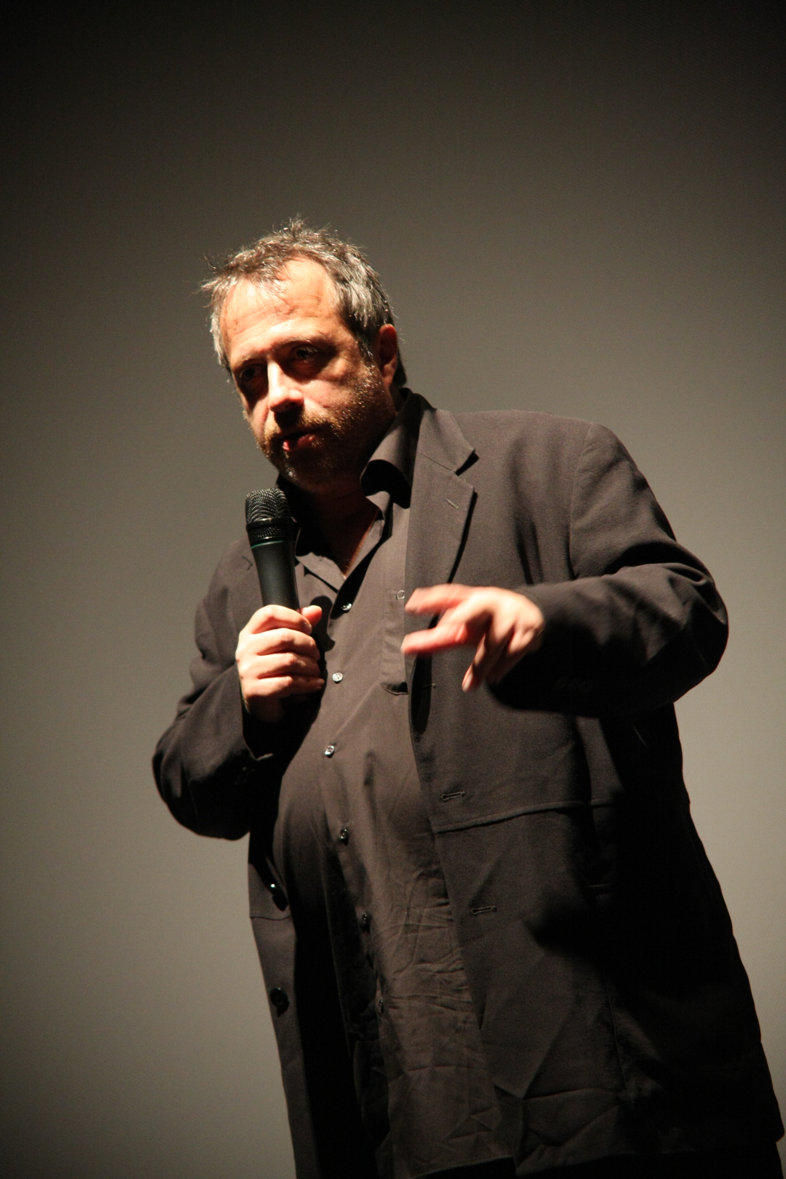 Mr Nobody Q&A